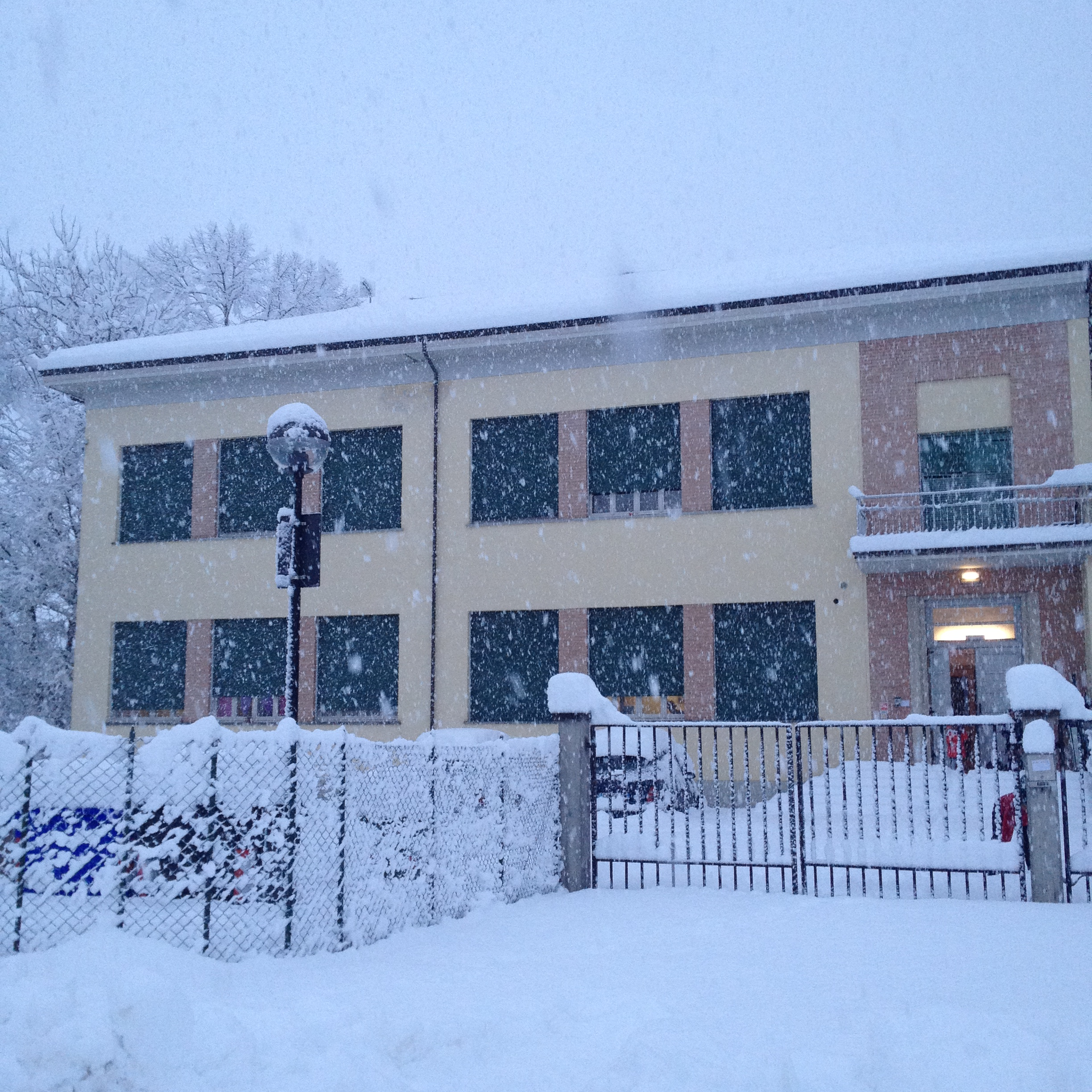 Pensionato Cavazzoli, ospitato nell'ex scuola elementare